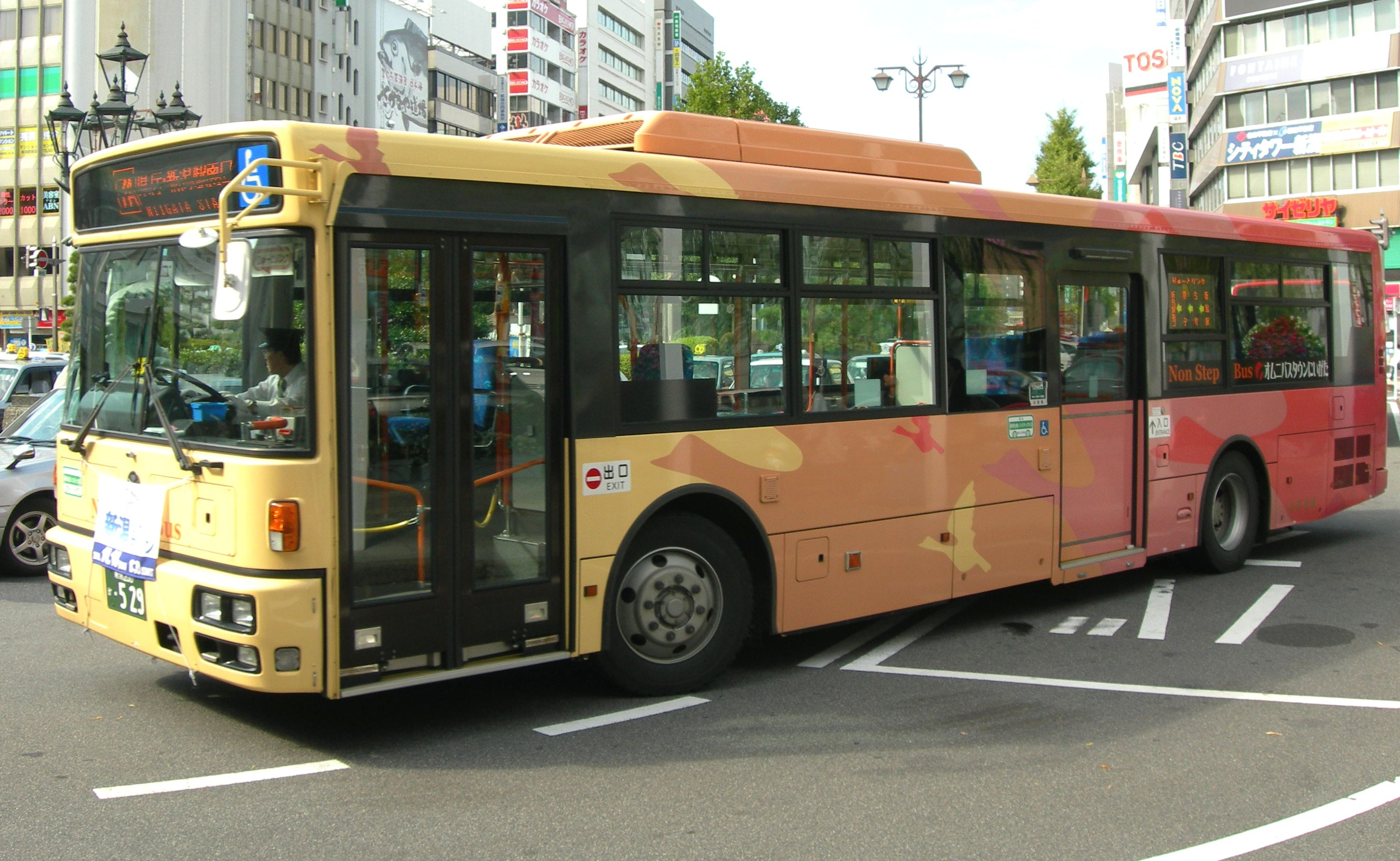 にいがた基幹バス りゅーとリンク 新潟200か529